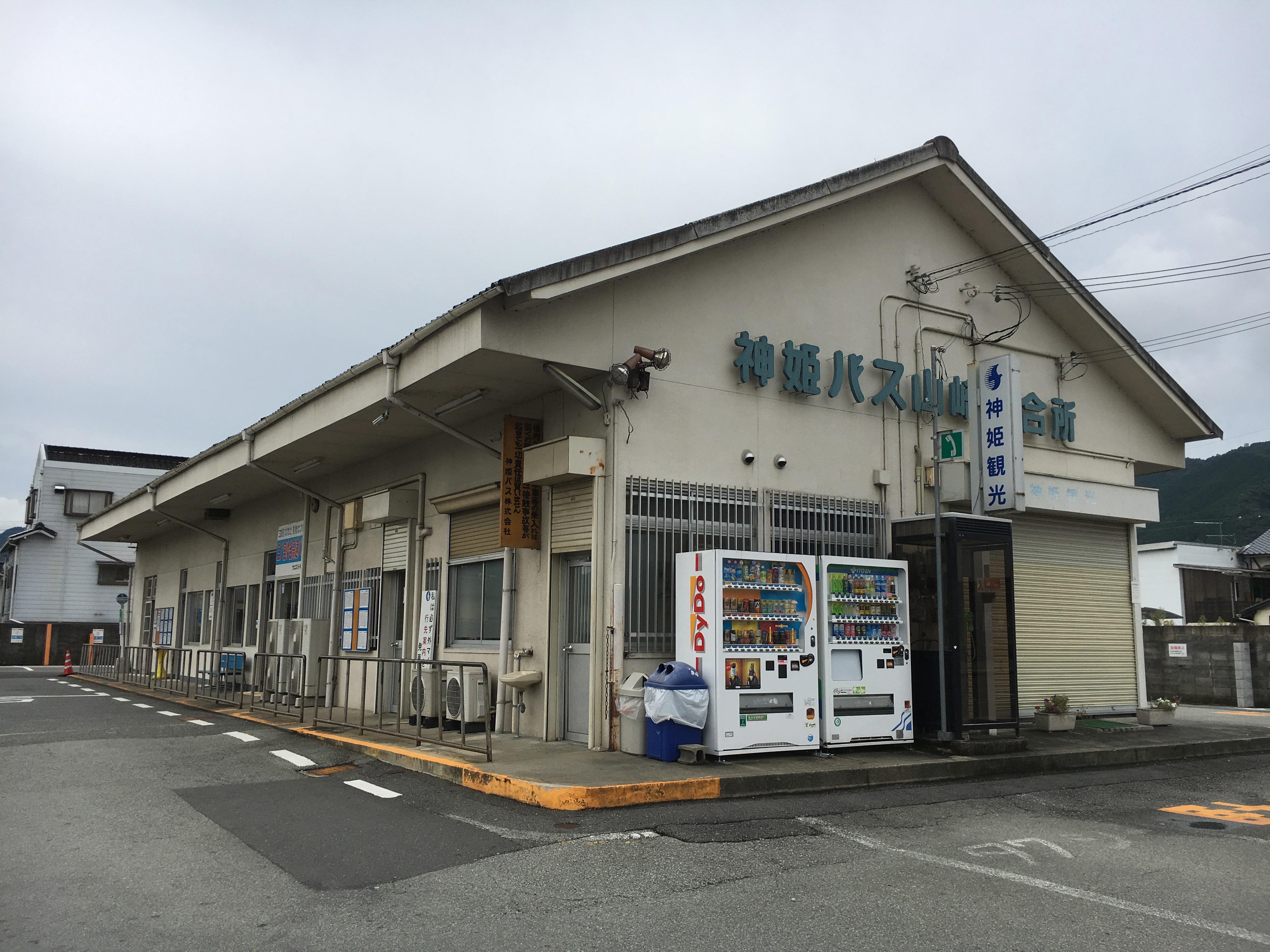 神姫バス山崎案内所（横から撮影）